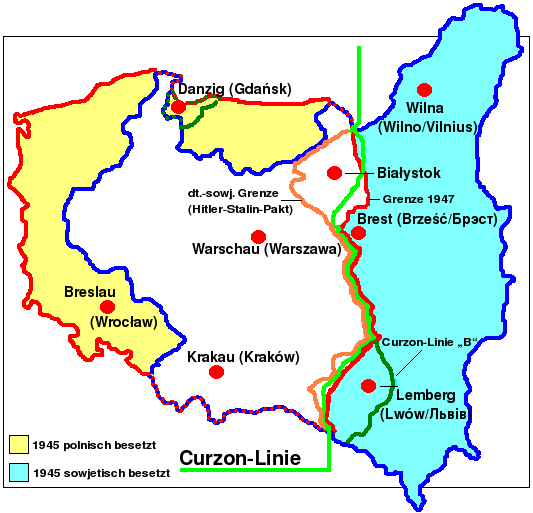 Karte von Polen 1945